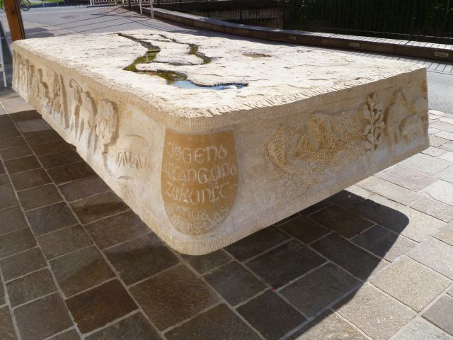 Sogenannter Zeitstein vor der Bachschmiede, dem Kulturzentrum von Wals-Siezenheim, Land Salzburg. In dem Stein aus Untersberger Marmor ist die Geschichte der Gemeinde in Bildern eingearbeitet.